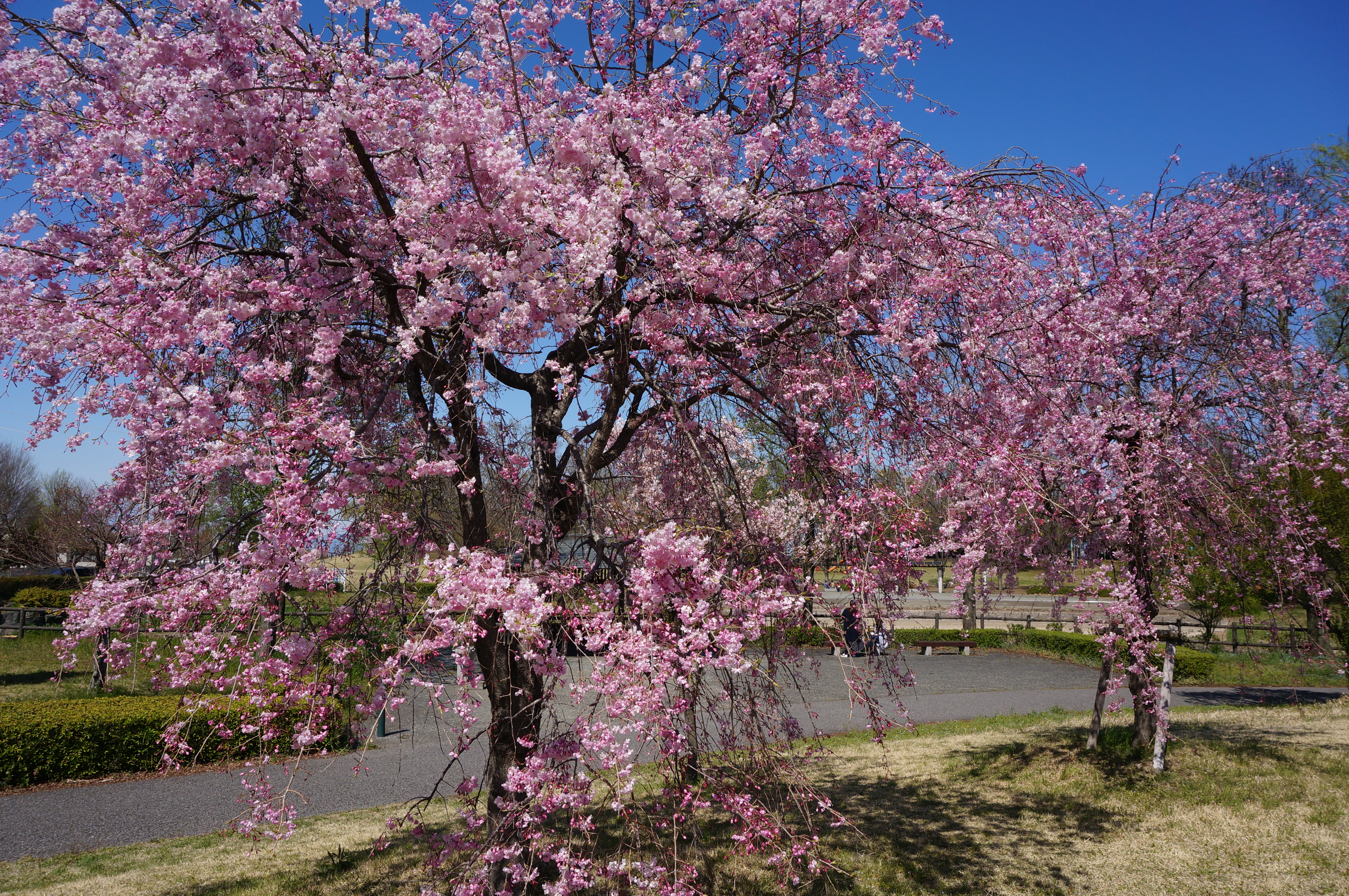 ヤエベニシダレ（埼玉県熊谷市別府沼公園にて）